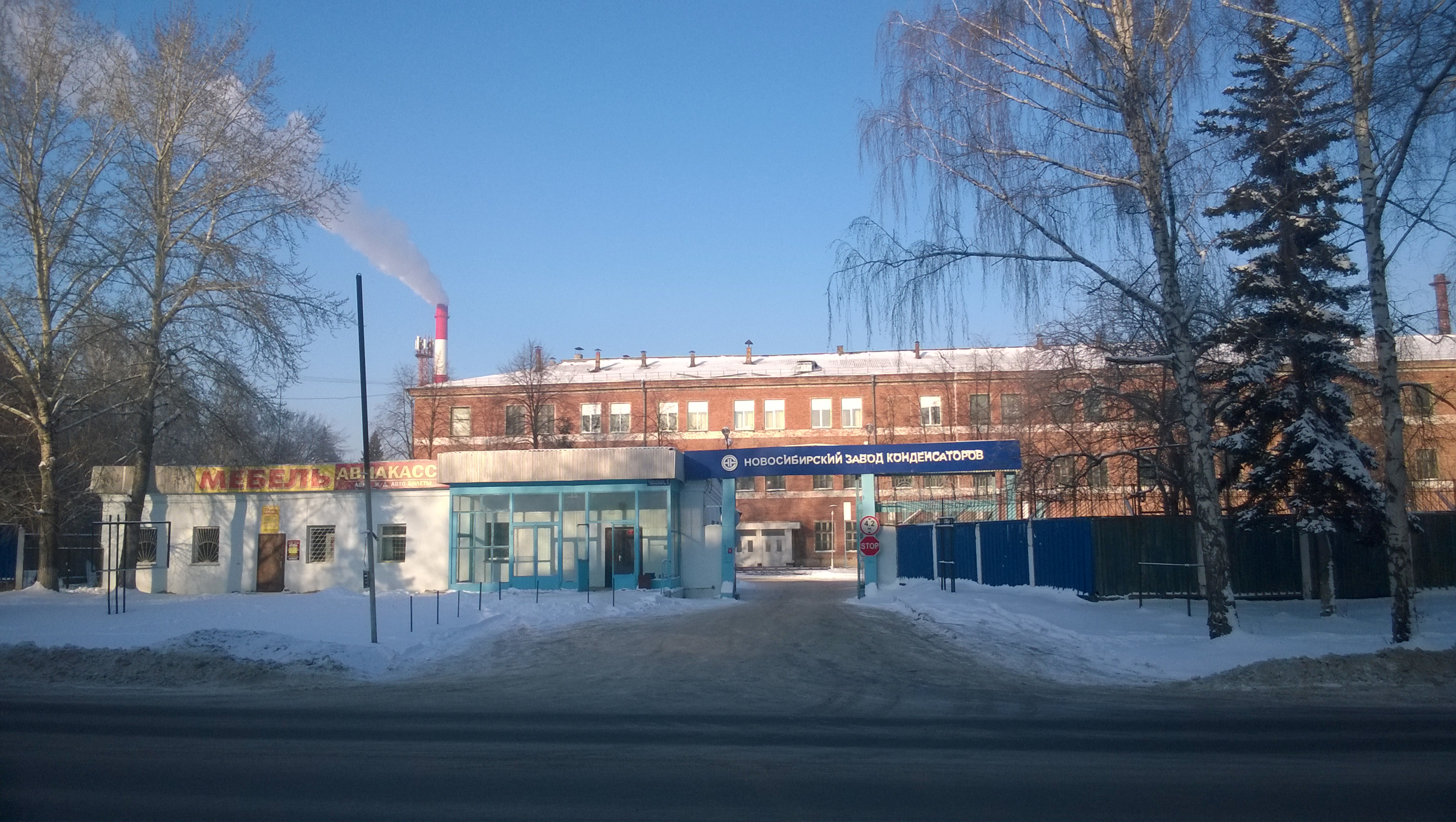 Новосибирский завод конденсаторов. Улица Часовая.